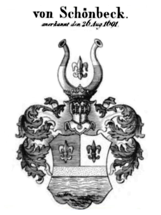 Wappen der von Schönebeck, früher auch Schönbeck, einer ursprünglich altmärkischen Patrizierfamilie, die seit dem 15. Jahrhundert in Stendal nachgewiesen ist.